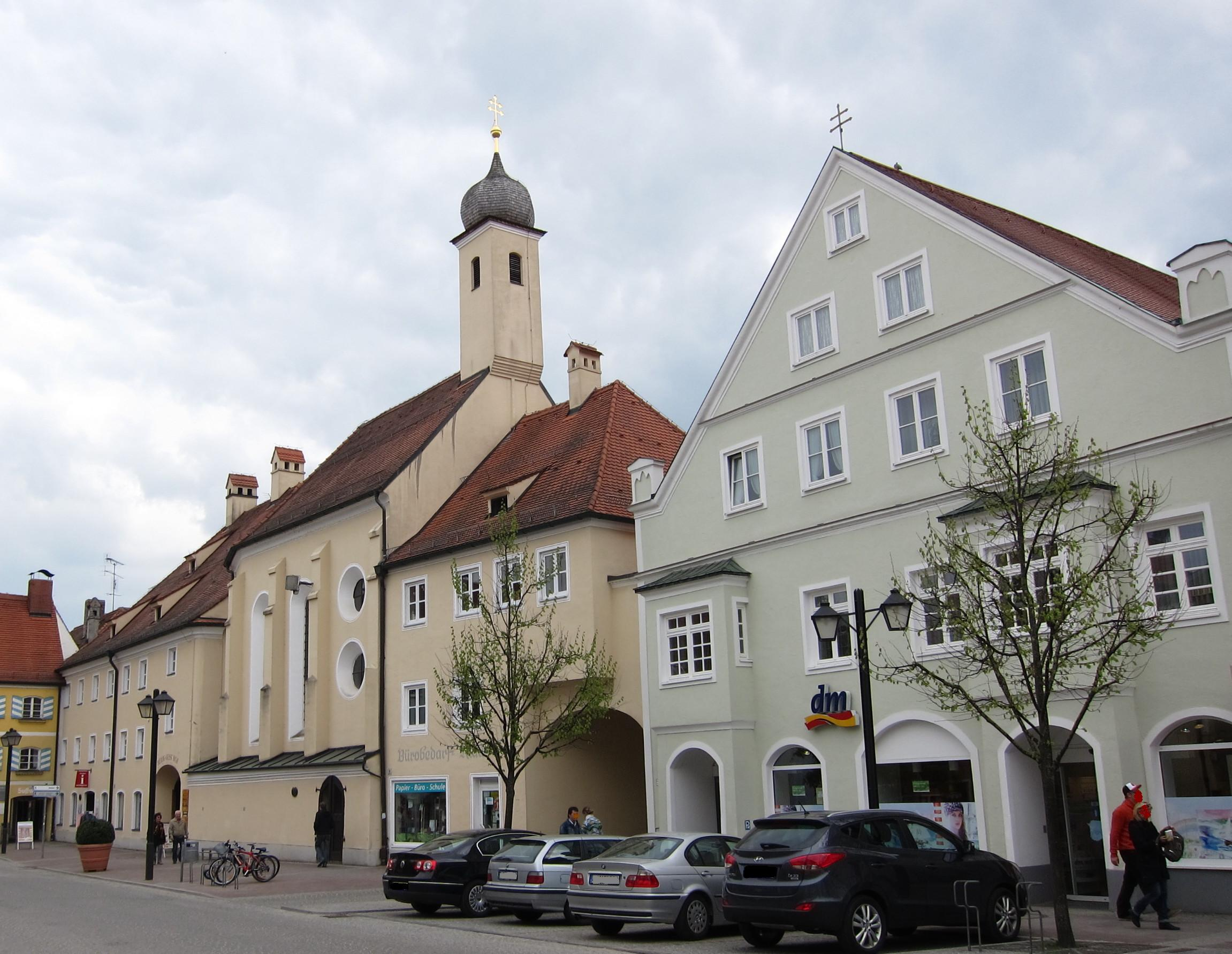 Erding, Landshuter Straße 6, Wohn- und Geschäftshaus, ehem. Gasthof, zweigeschossiger Satteldachbau mit Flacherkern, im Kern 17. Jh.; anschließend Spitalkirche Hl. Geist, kleiner Saalbau mit Dachreiter, bez. 1444, 1688 barockisiert; anschließend ehem. Hl. Geist-Spital, dreigeschossiger Satteldachbau mit breiter Tordurchfahrt, Mitte 15. Jh., Fassade 17. Jh.